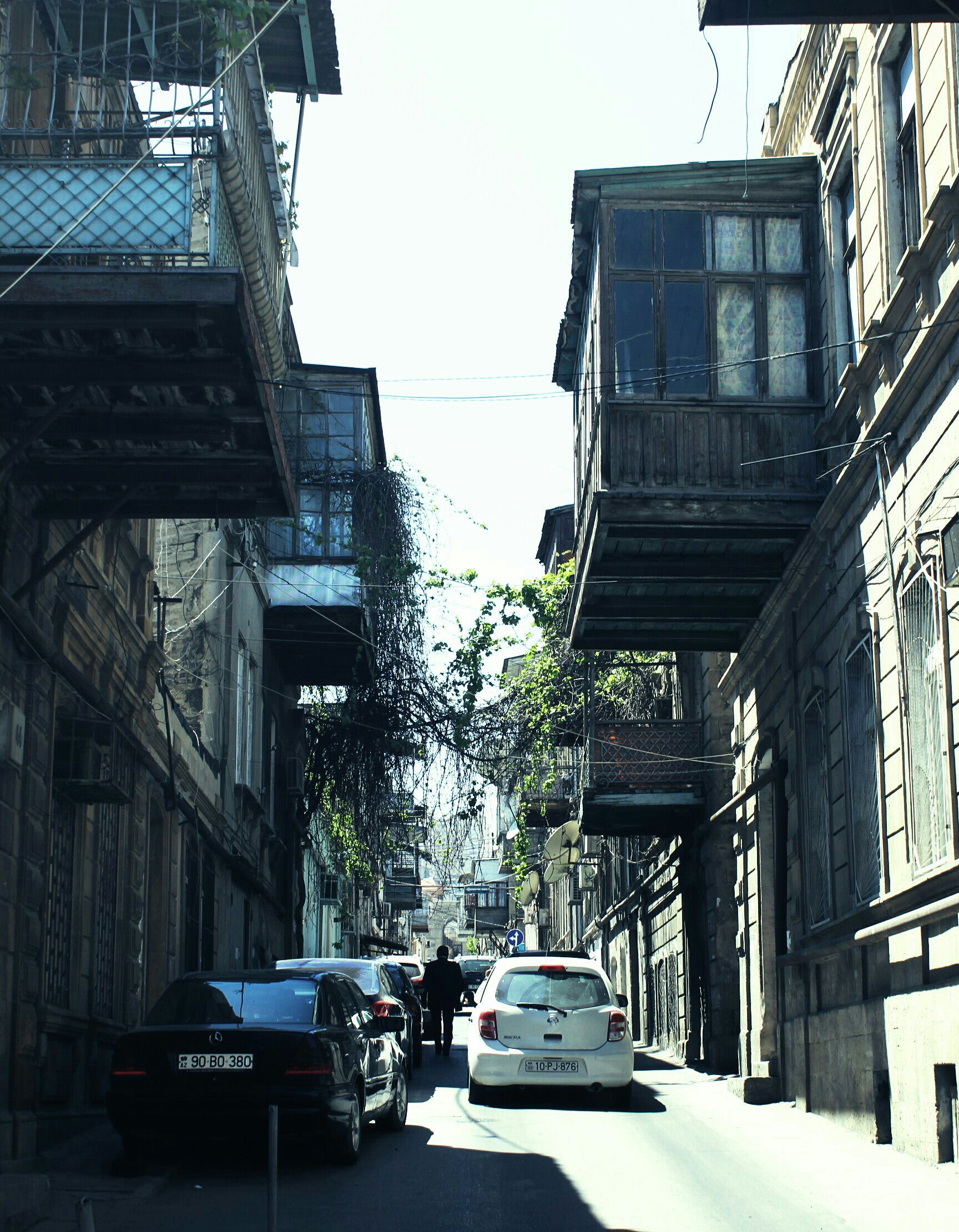 Baku,Azerbaijan